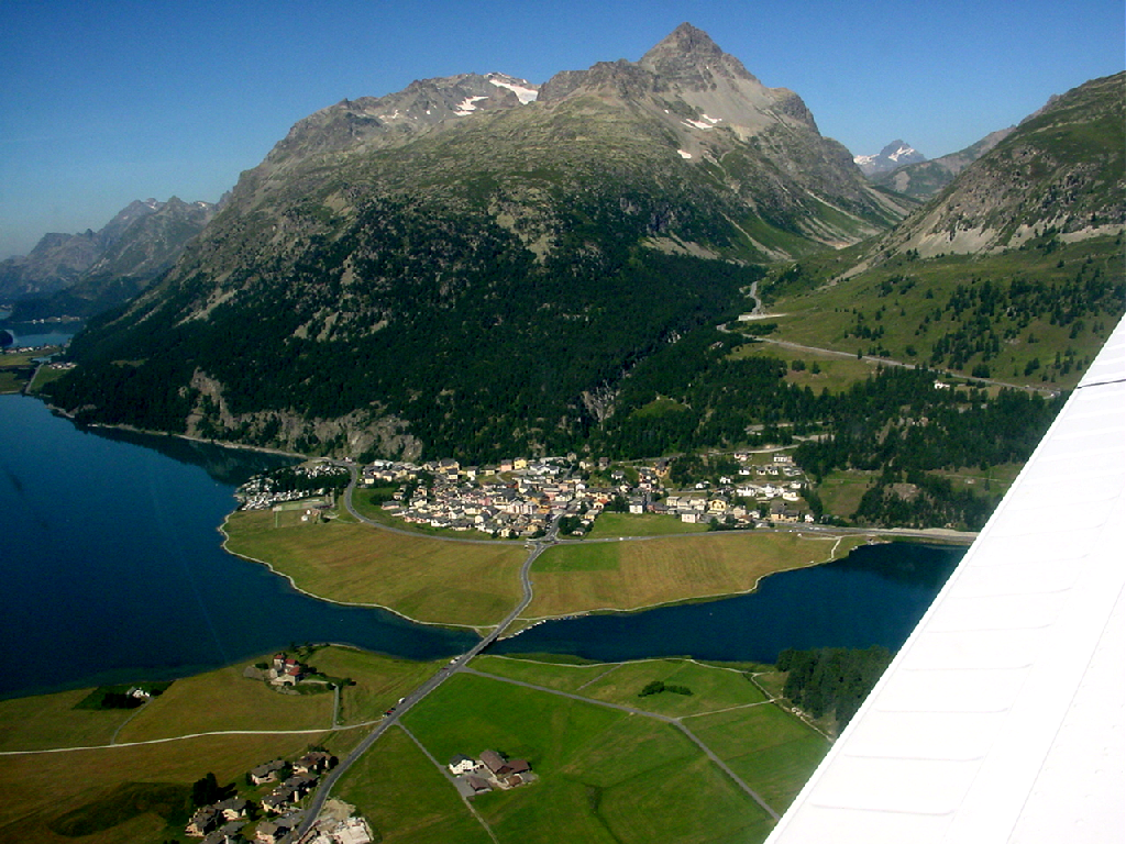 Localité de Silvaplana son lac (à gauche) et le lac de Champfèr (à droite) (cliché 13.07.2003)